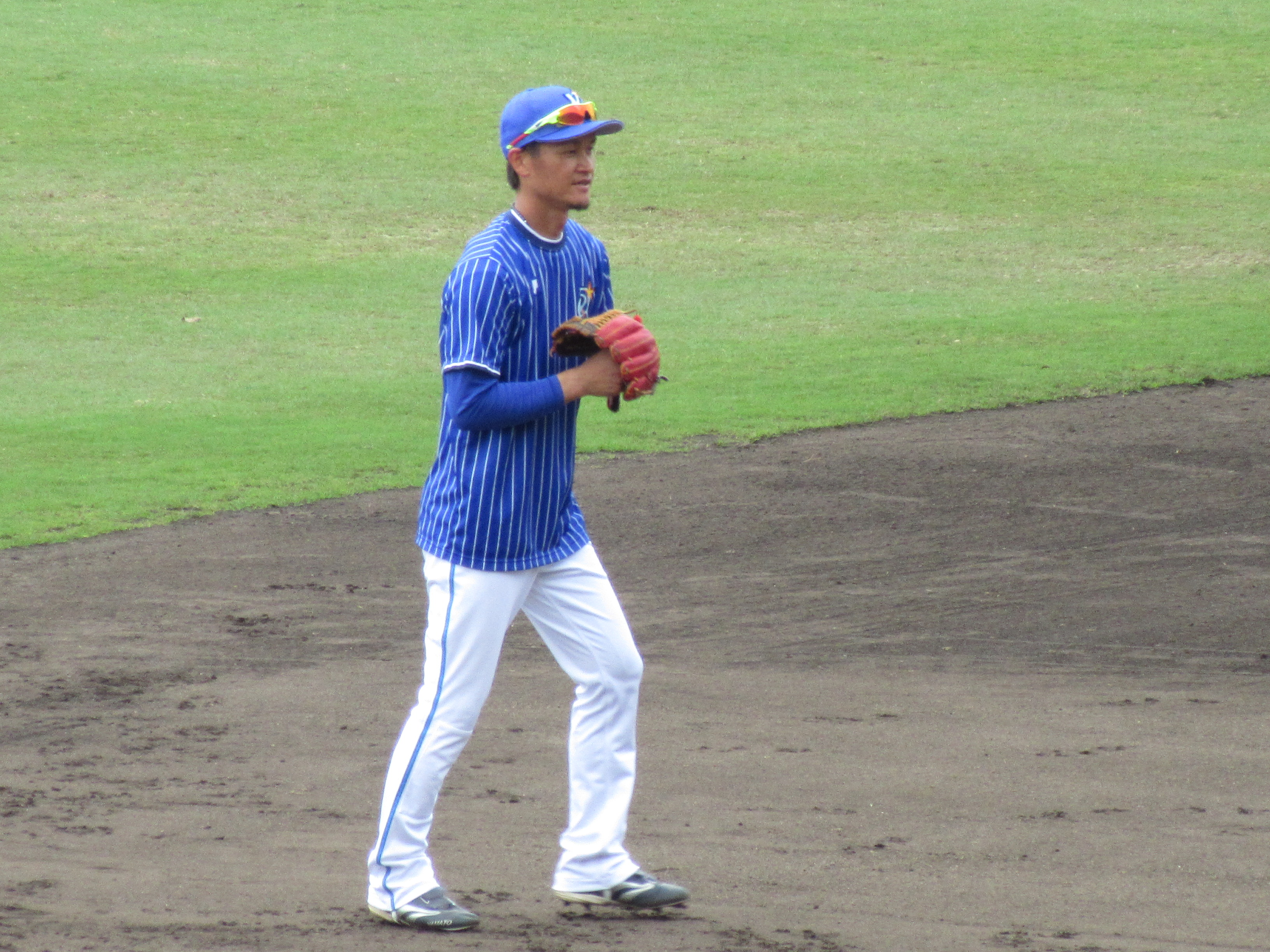 Yokohama DeNA Baystars Yamato 2018